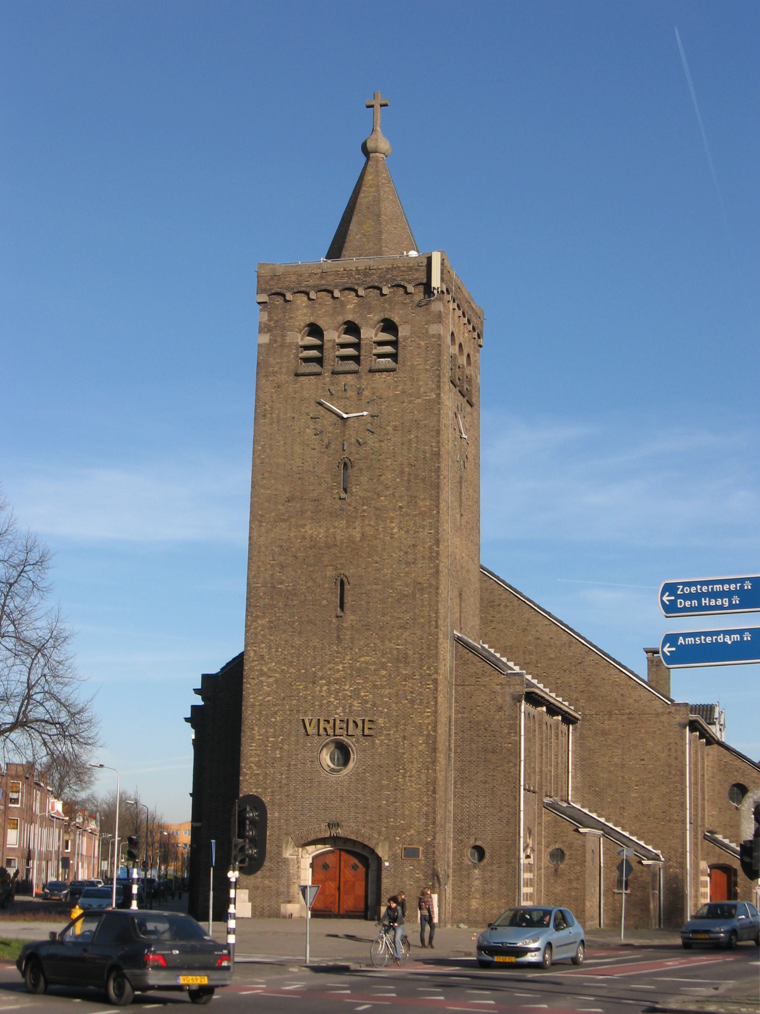 R.k. kerk van het Allerheiligst Sacrament, Nassaulaan, Delft (Henri Thunnissen, 1938-40)